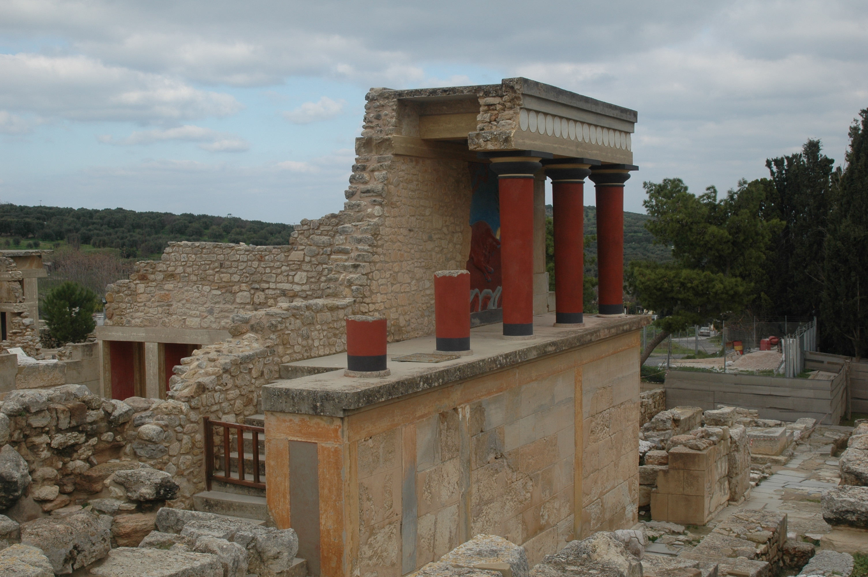 Knossos, Palais. Photo prise par Harrieta171 le 28/01/06